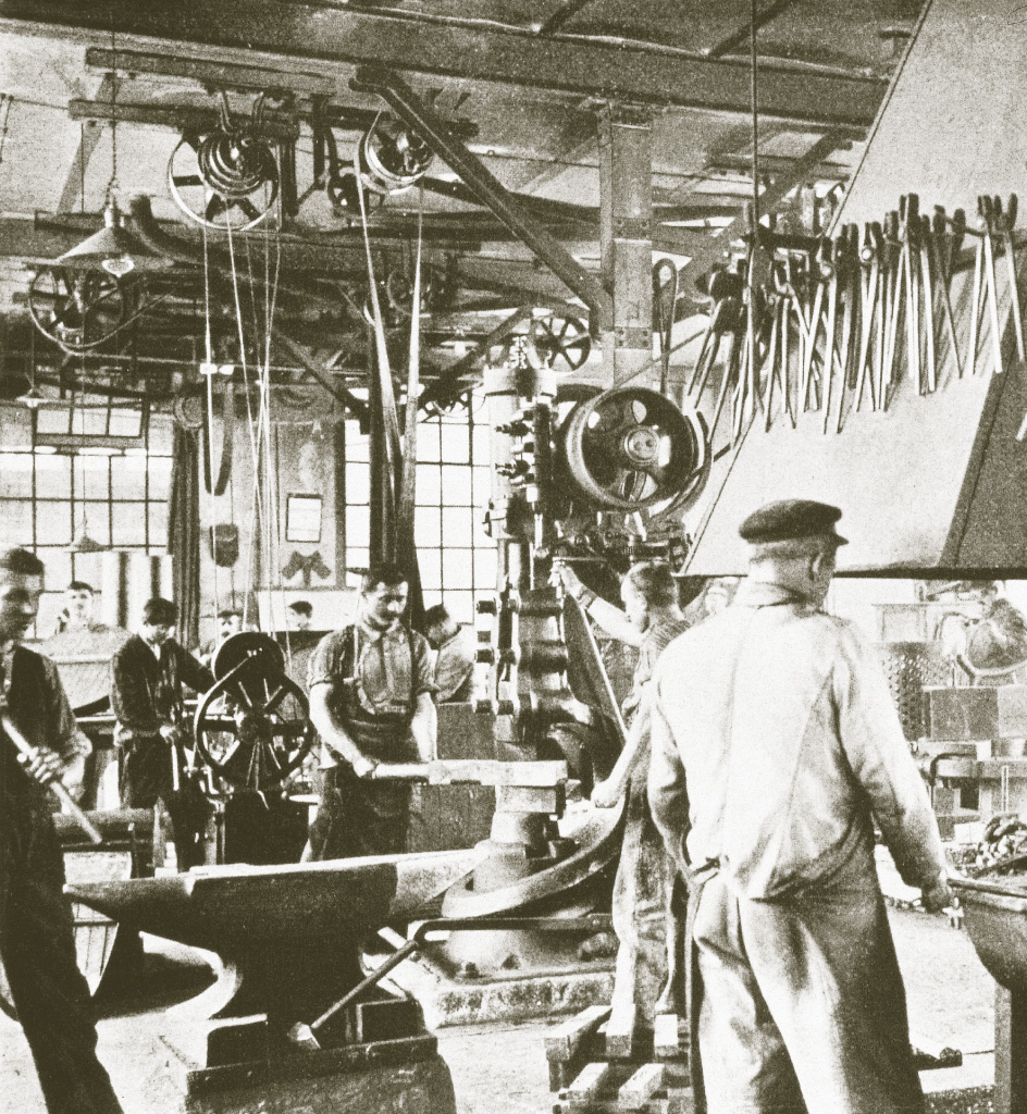 Beschreibung: Erste Produktionsstätte Ammann's in Madiswil